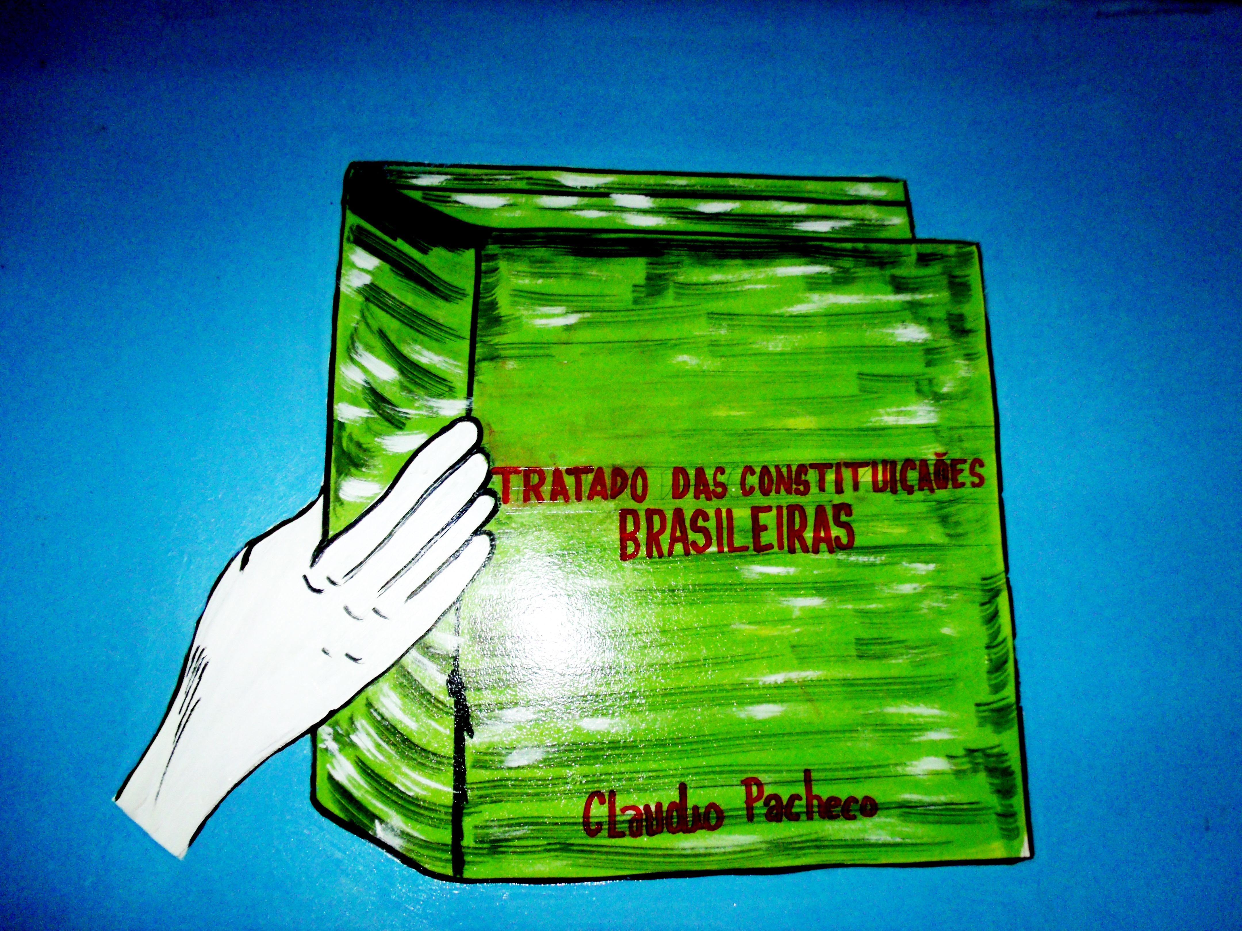 Imagem representando, não fielmente, uma obra do jurista Cládio Pacheco Brasil pintada nas paredes da biblioteca municipal de Campo Maior, terra natal do jurista.